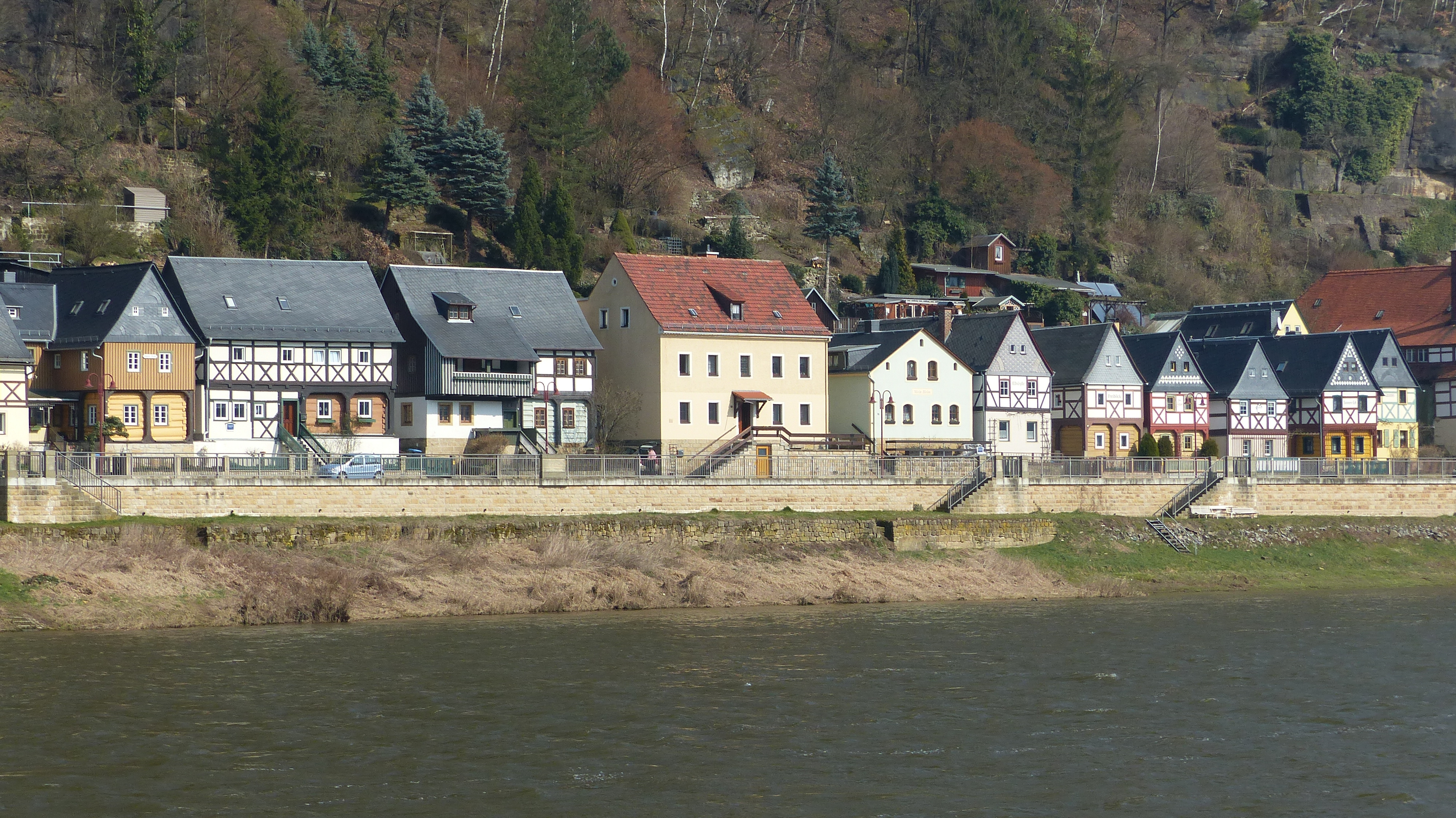 Denkmalgeschützte Umgebinde- und Fachwerkhäuser in Postelwitz; Elbufer 47, 49, 51, 57, 59, 61, 63, 65, 67